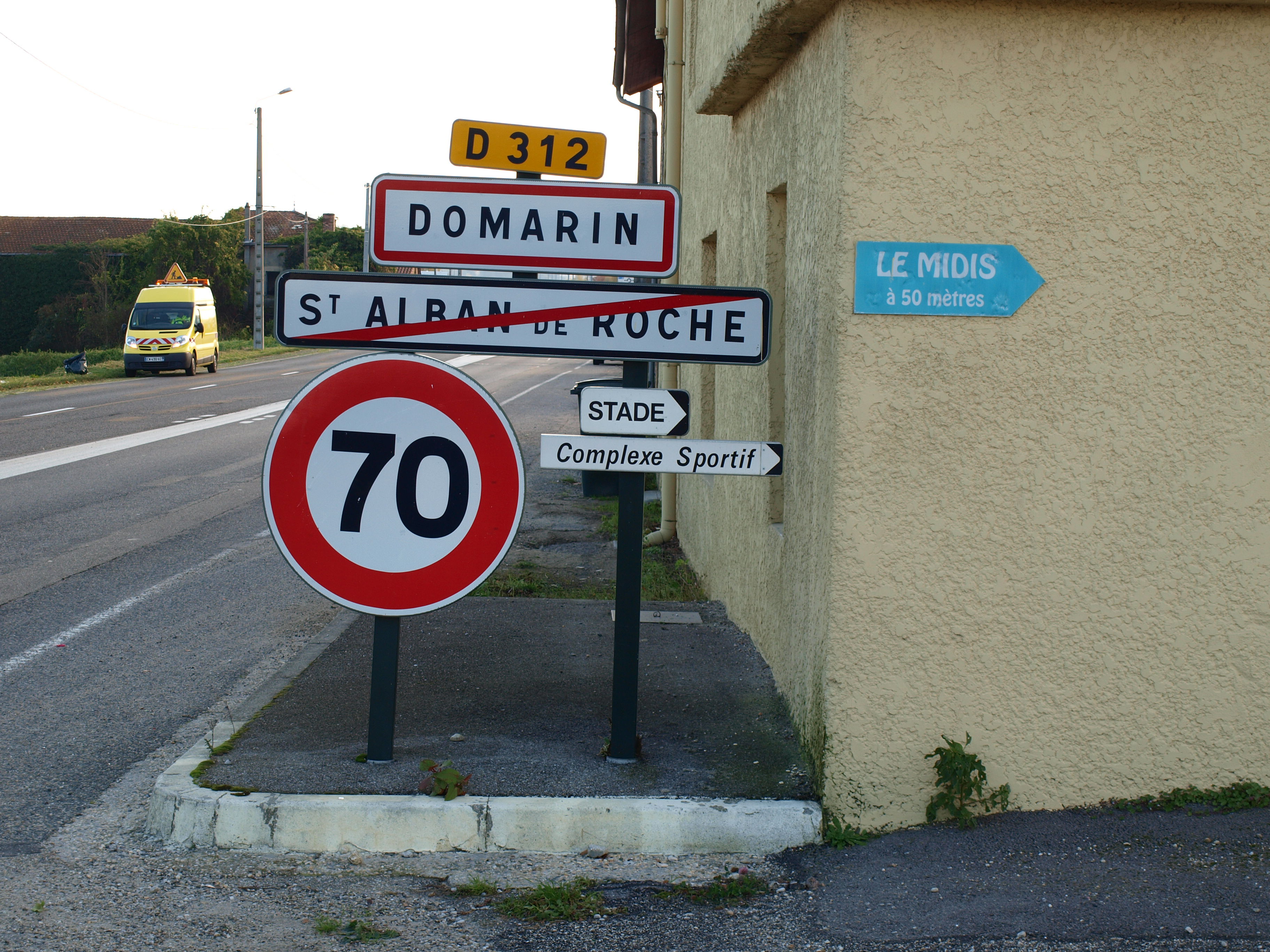 Domarin (Isère, France) ; panneau d'agglomération